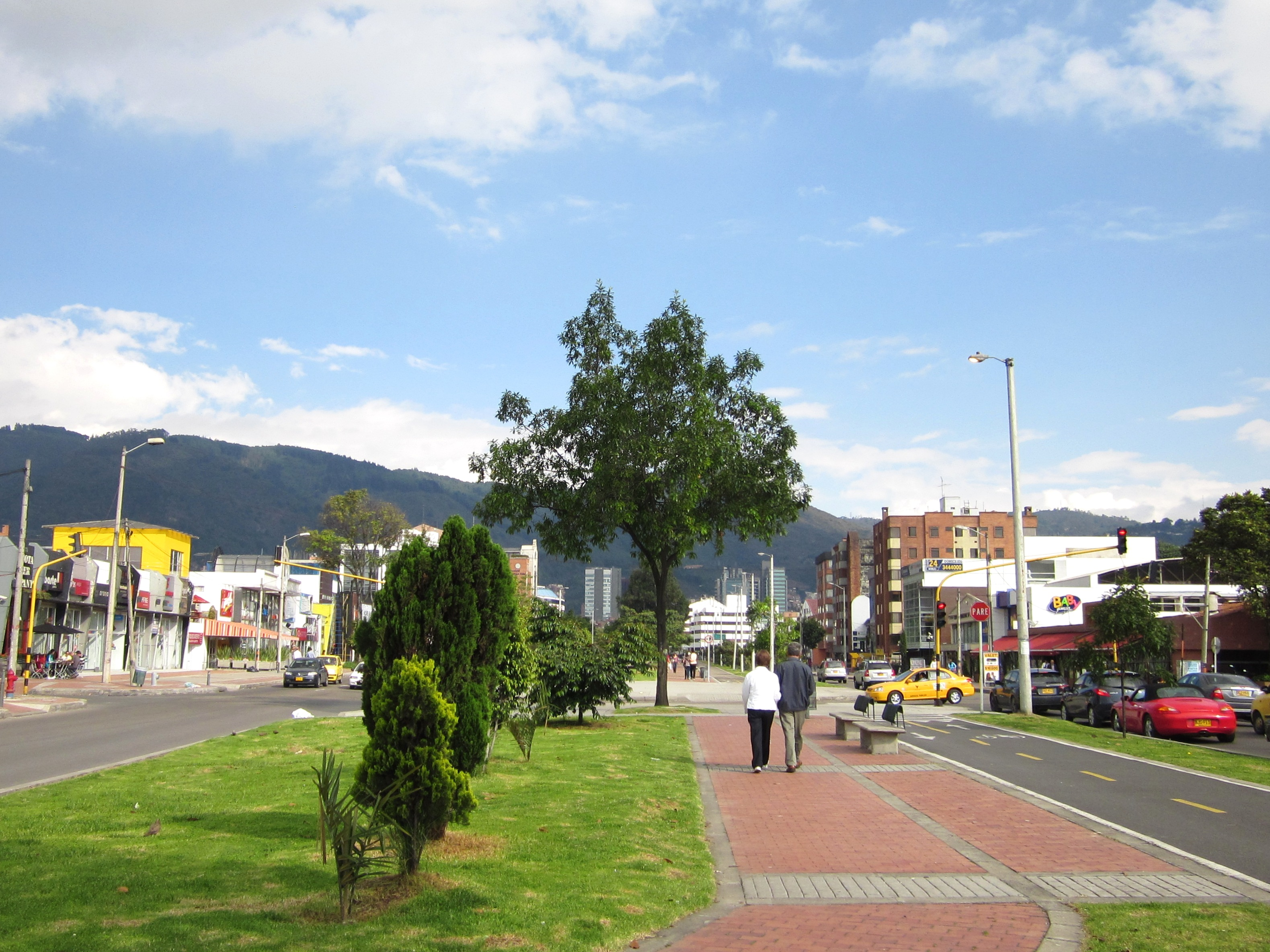 Avenida Pepe Sierra con avenida Diecinueve, localidad de Usaquén.